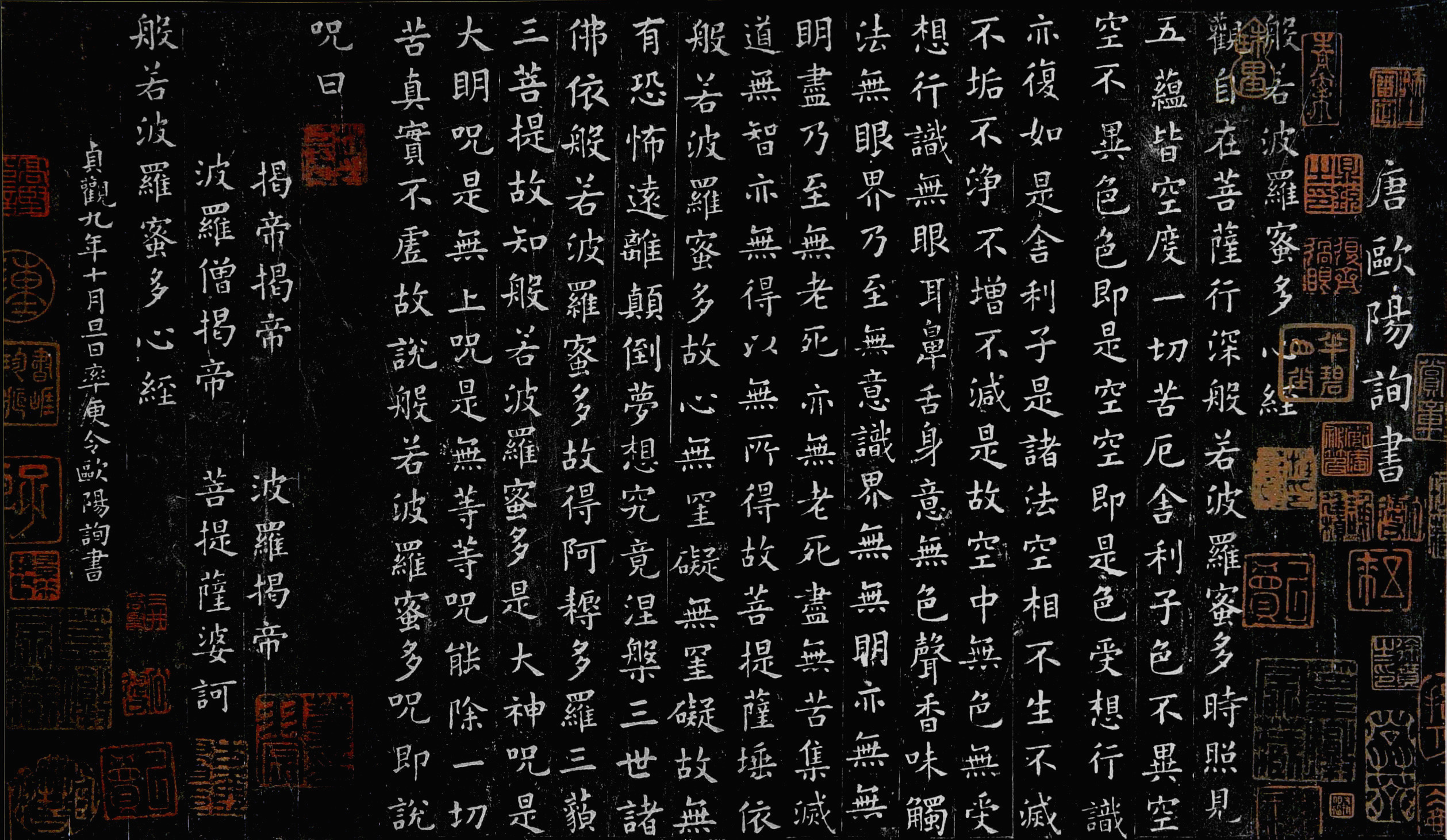 歐陽詢(557-641年)書寫《般若波羅蜜多心經》。本帖落款為貞觀九年書寫，而此版本的心經是玄奘於貞觀二十三年翻譯的，所以應該是後人用歐陽詢書寫的字綴集而成。